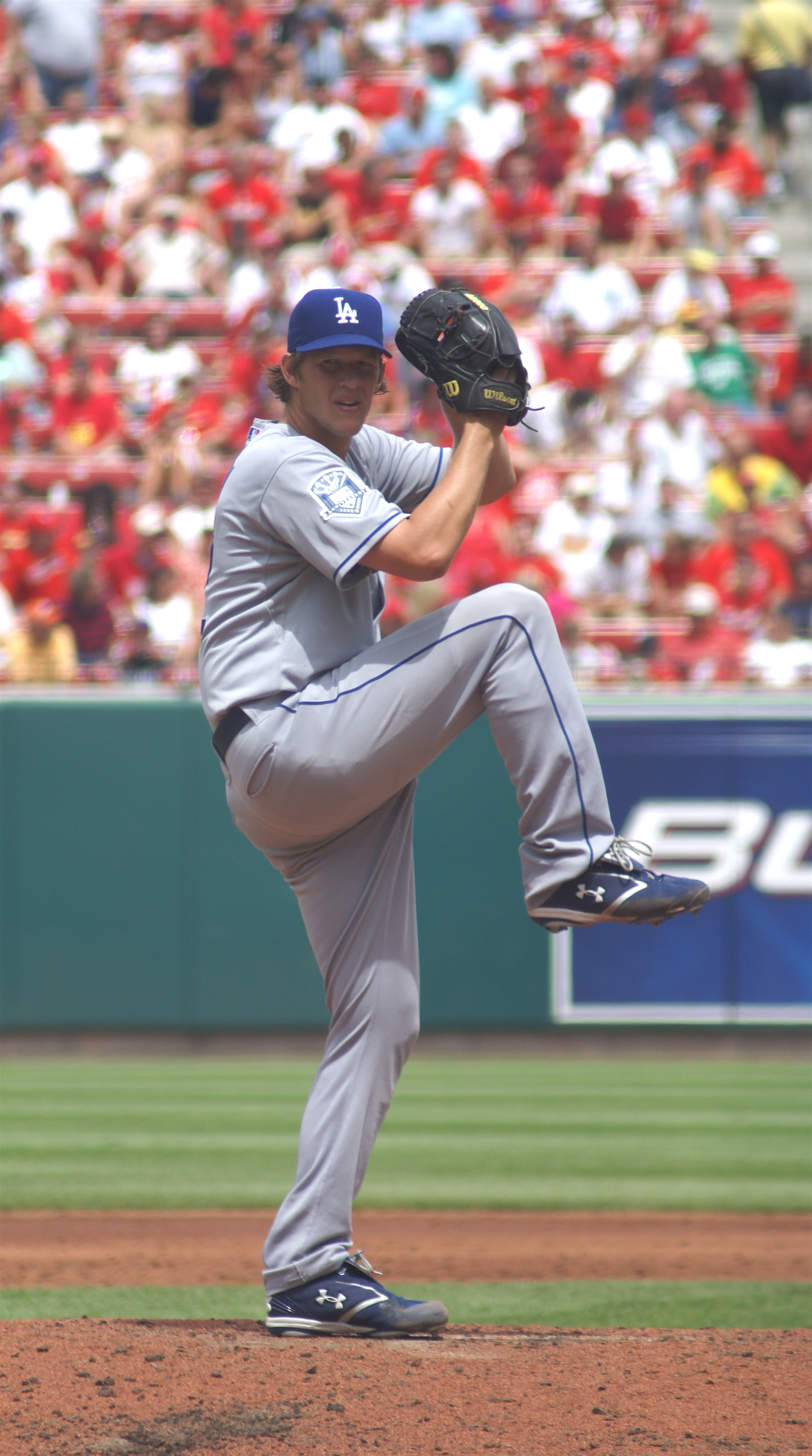 CLAYTON KERSHAW